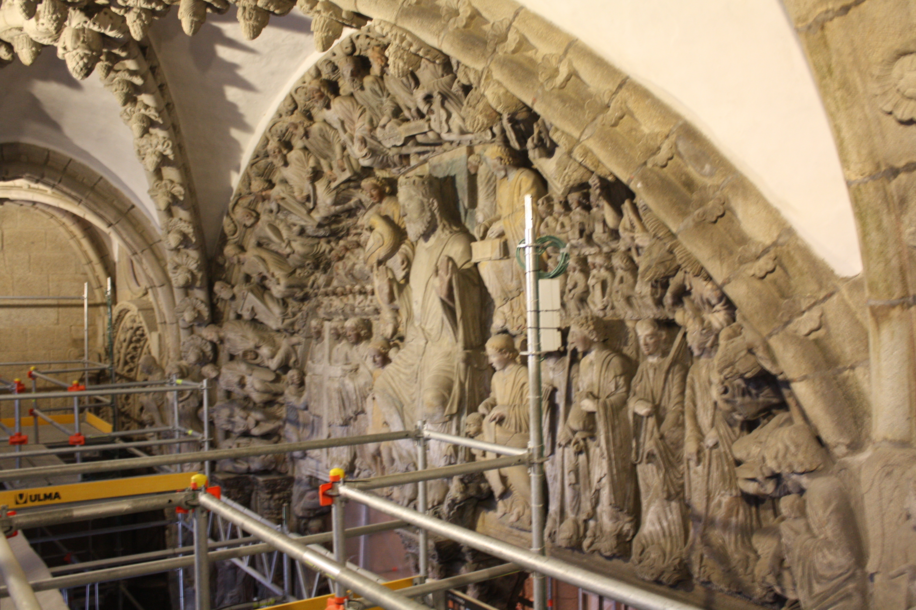 Pórtico da Gloria en restauración.